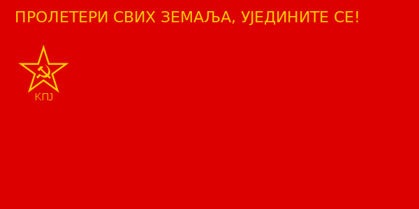 Srpskohrvatski / српскохрватски: Застава Комунистичке партије Југославије / Zastava Komunističke partije Jugoslavije